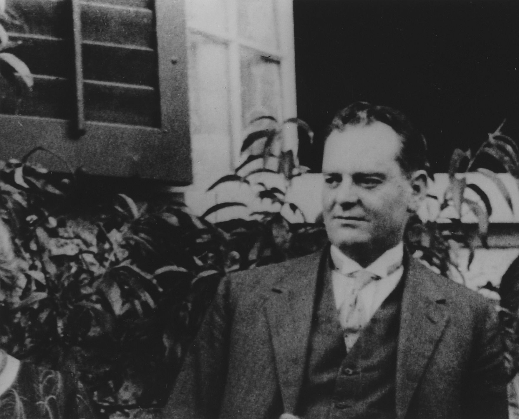 Porträt Gottlieb Duttweiler um 1930